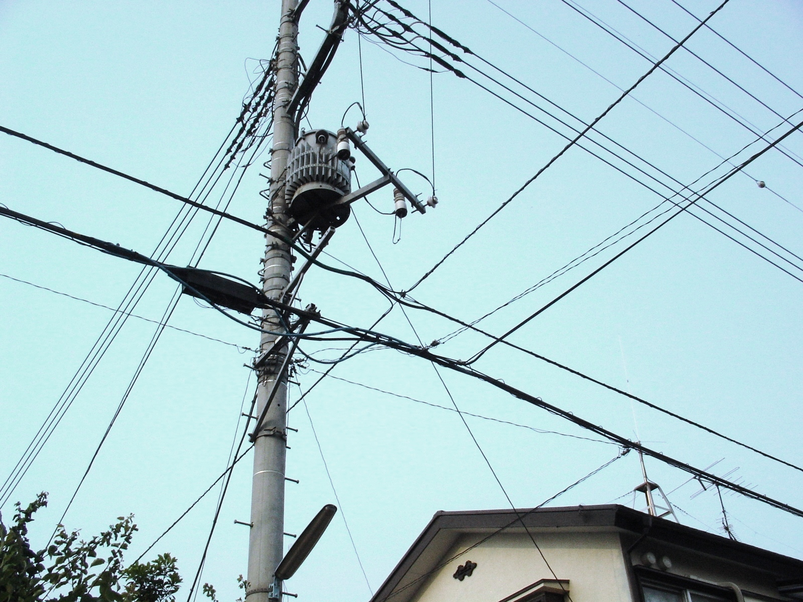 image insolite mais finalement très facile à prendre au Japon. Exemple assez représentatif de l'allure du réseau de distribution électrique auquel vient s'emmêler comme un lierre celui des télécommunications.